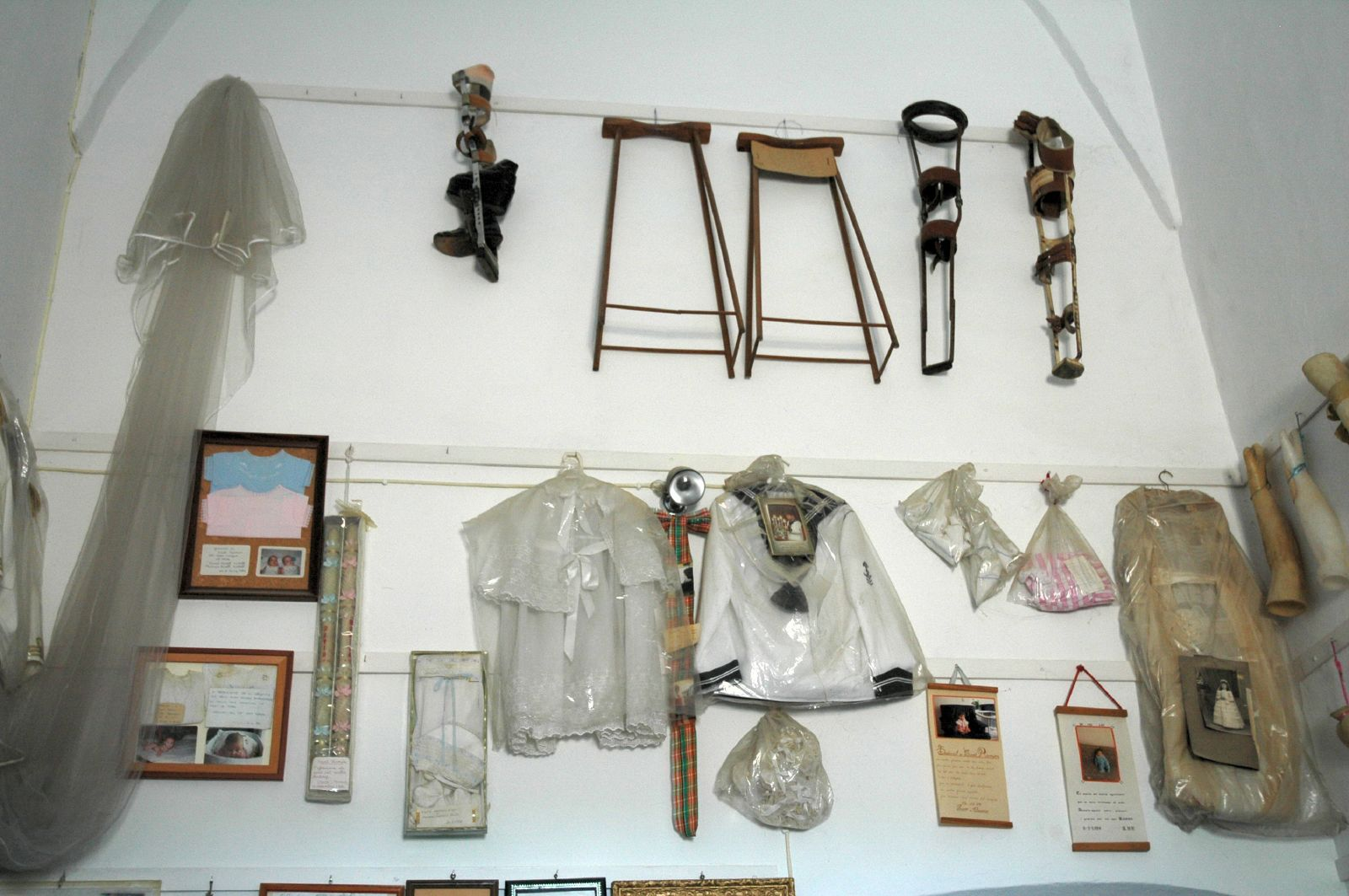 Ex-vots al Santuari de Sant Ramón,a la Segarra Object location41° 43′ 33.49″ N, 1° 22′ 08.9″ E